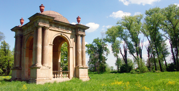 Tereziánský altán-Veltrusy. Pavilon Marie Teresie